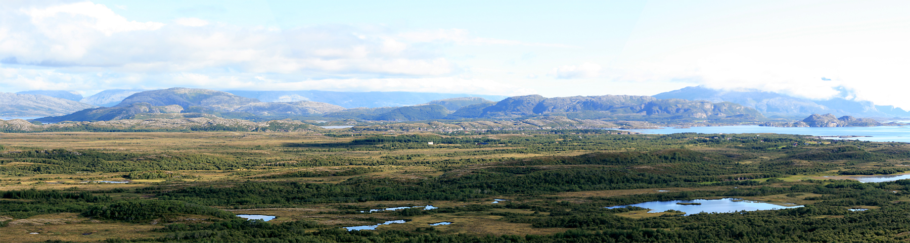 Utsikt over Dønna fra Dønnesfjellet. Altervatn naturreservat i forgrunnen.